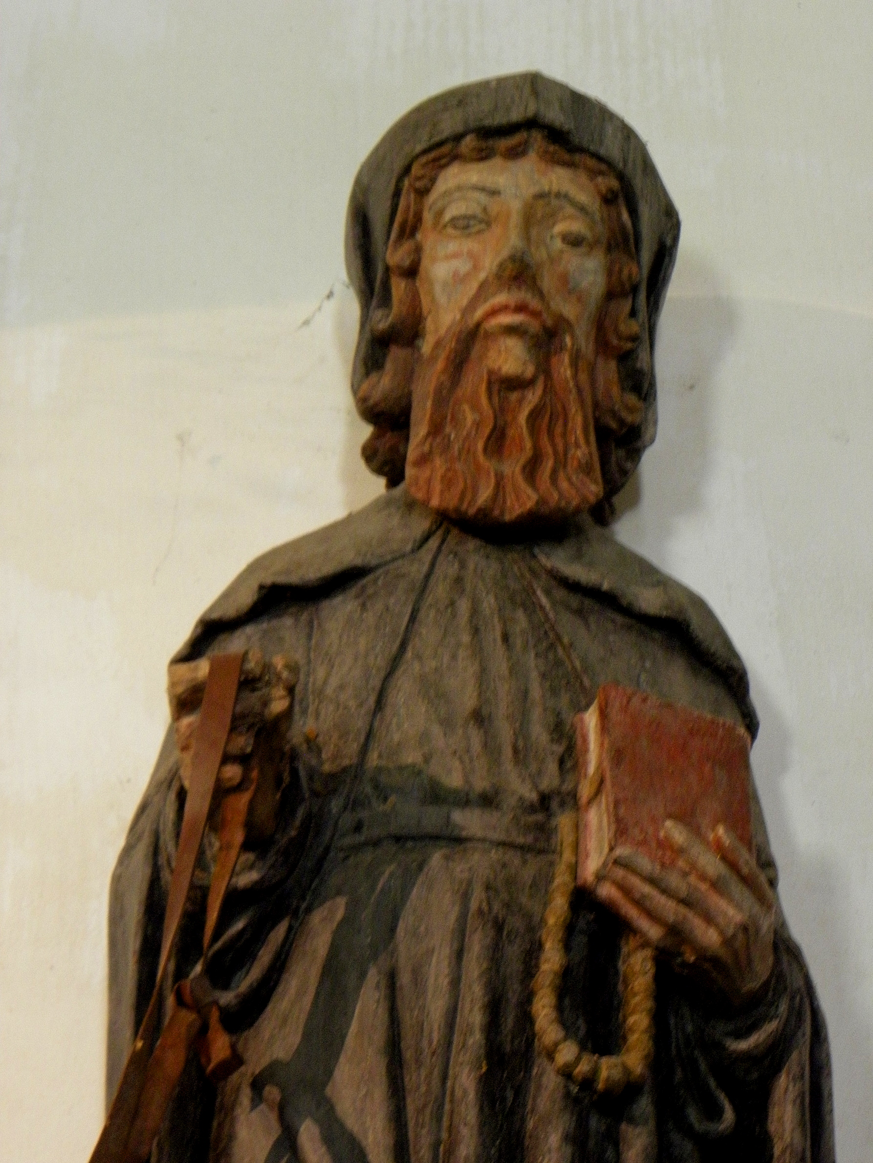 Statue de Saint-Hervé.